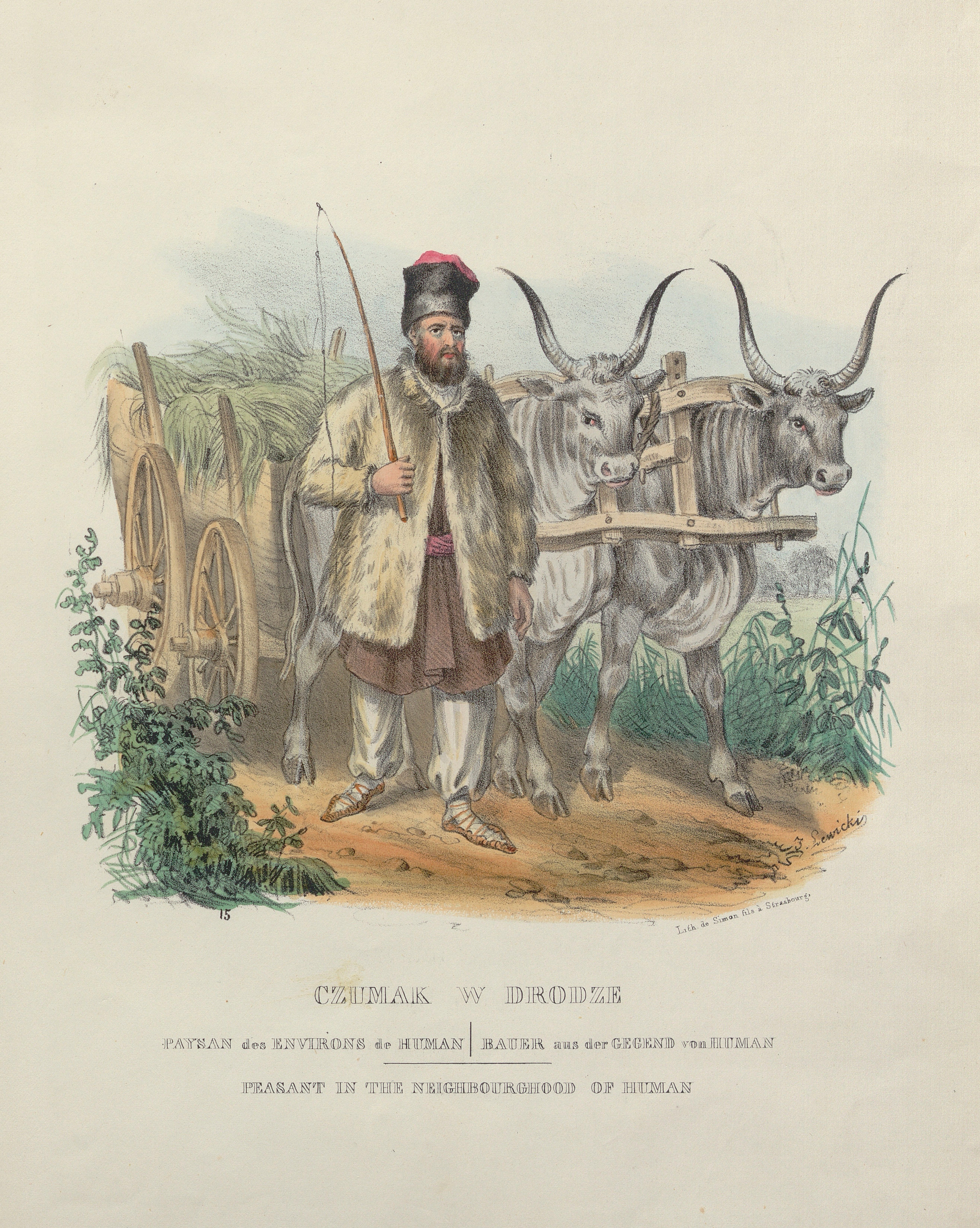 Чумак 1841. Chumak of Uman. Ukrainian.